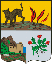 Дербент (Дагестан), герб (1843 г.)